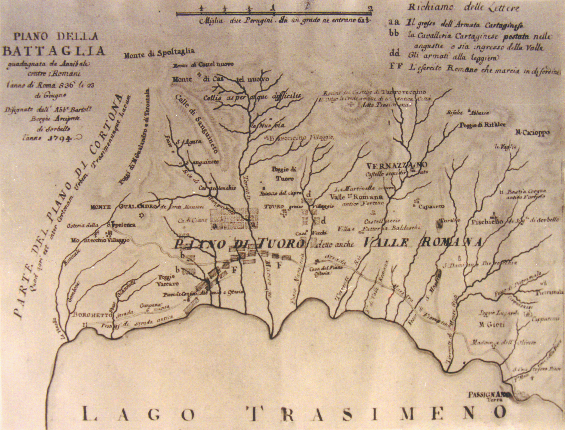 "Piano della Battaglia guadagnata da Annibale contro i Romani l'anno di Roma 536 li 23 di Giugno. Disegnata dall'Abbate Bartolomeo Borghi Arciprete di Sorbello l'anno 1794" Mappa disegnata dal geografo Bartolomeo Borghi nel 1794 raffigurante le sponde settentrionali del Lago Trasimeno e la battaglia del Trasimeno